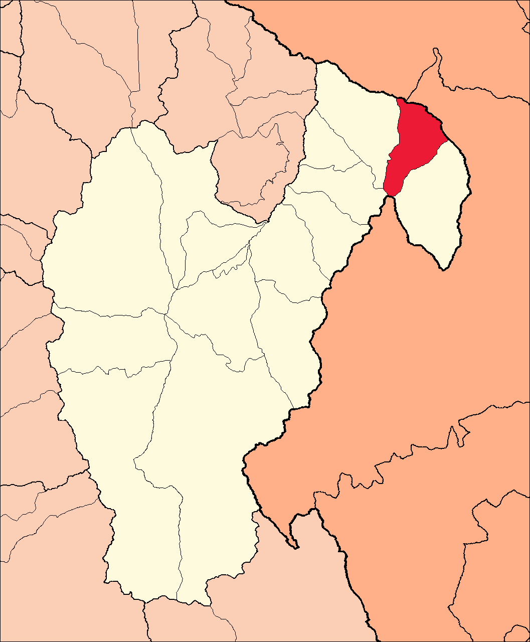 Área del distrito de Huacchis dentro de la provincia de Huari.